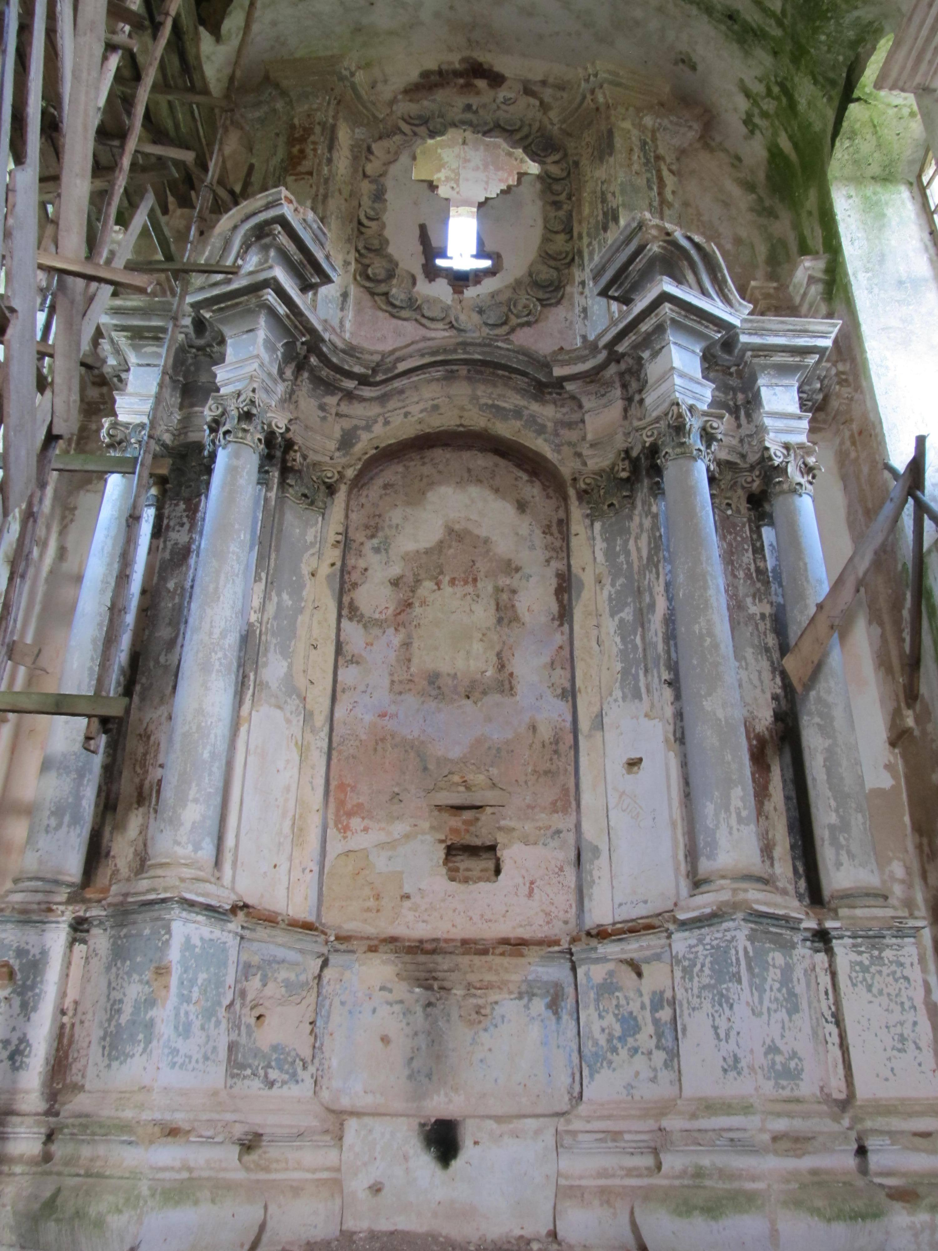 Беларуская (тарашкевіца): Касьцёл Сьв. Мікалая. в. Княжыцы This is a photo of Belarusian heritage monument. Reference number: 512Г000493 ( WLM)